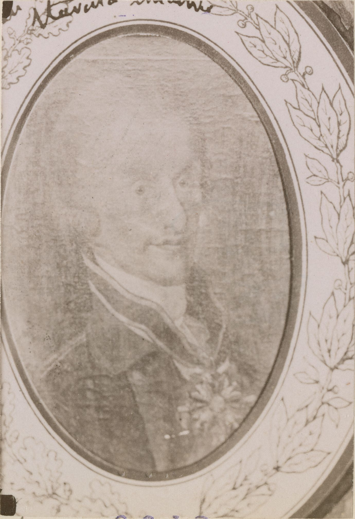 Беларуская (тарашкевіца): Партрэт Яна Мікалая Хадкевіча (Jan Mikałaj Chadkievič).